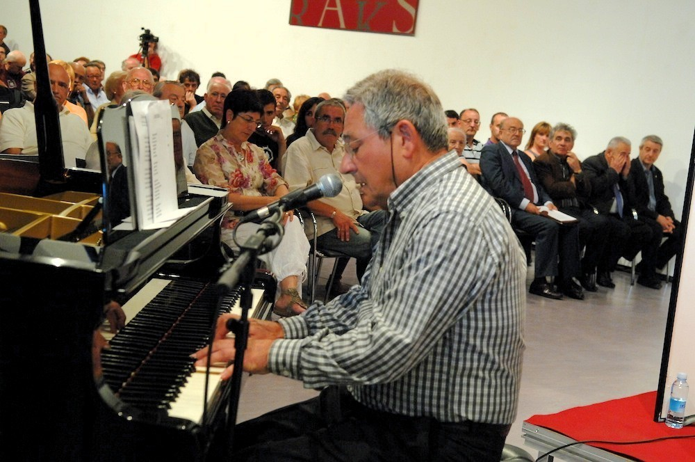 Antton Valverde abeslaria, 2011n.